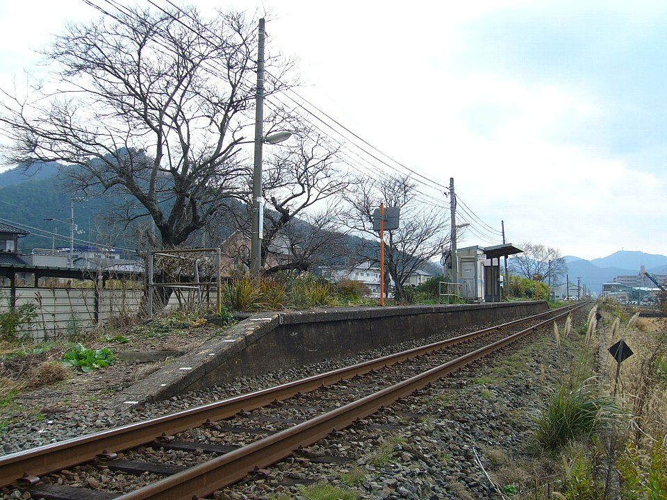 上宇和駅構内